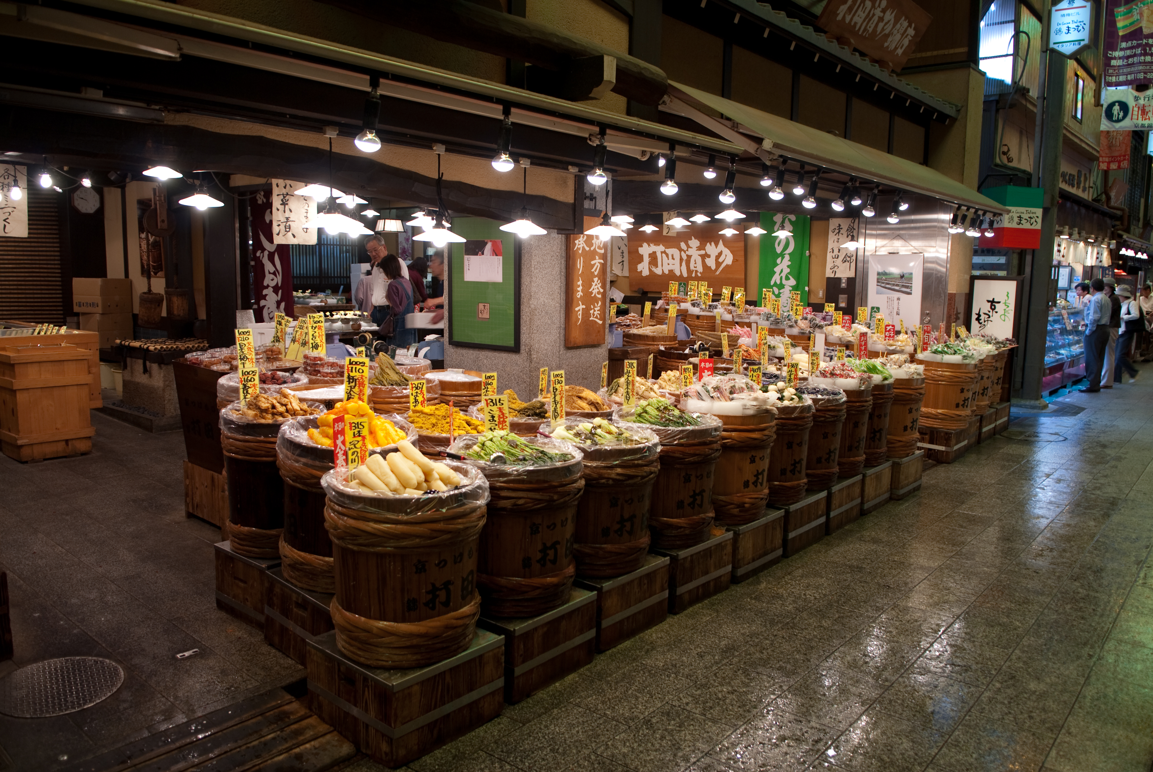 漬物屋（京都・中京区錦小路通柳馬場西入ル中魚屋町484、錦市場の漬物屋「打田漬物」[1]錦小路店[2]） }